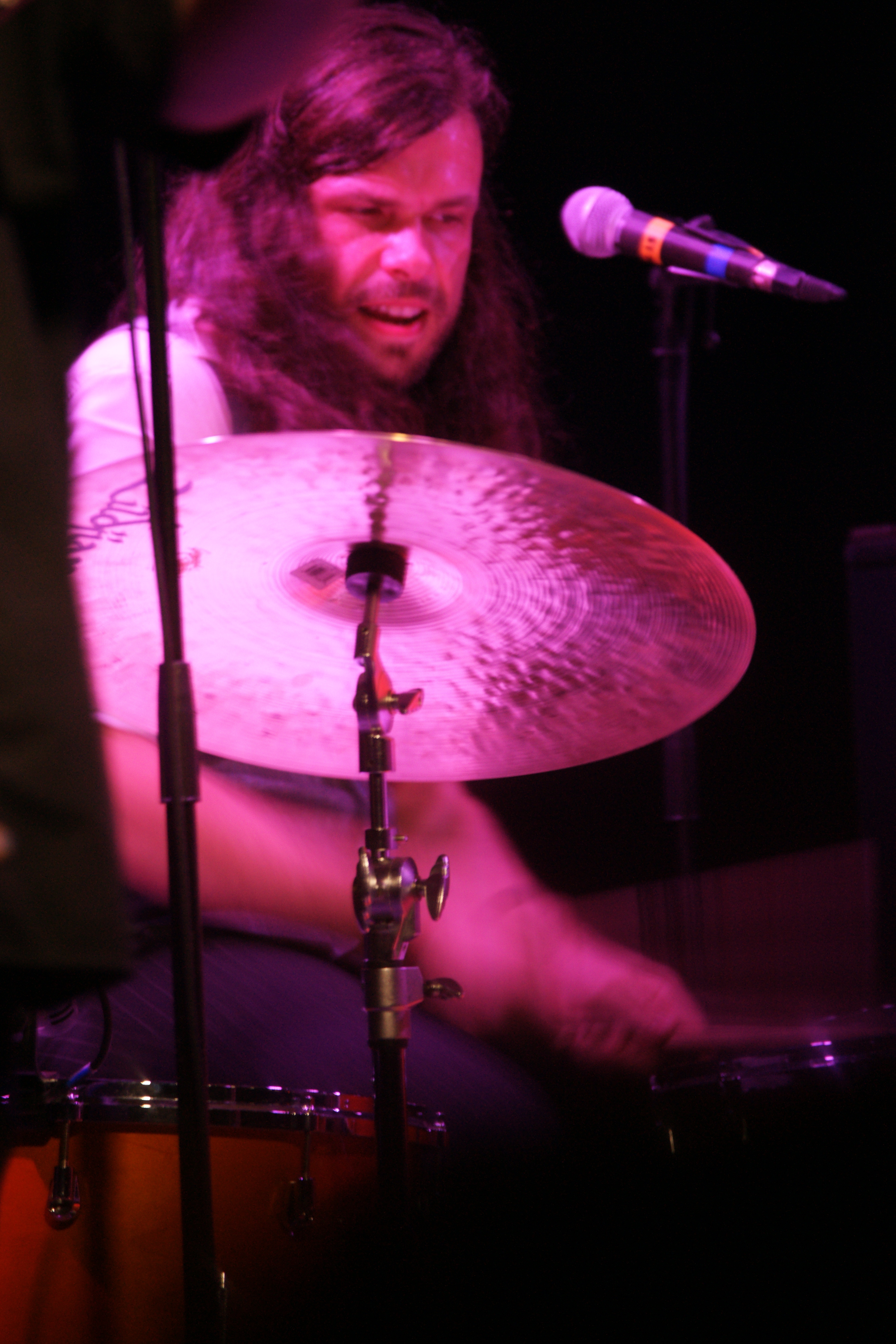 Josh Dion en concert à Nice, 2012